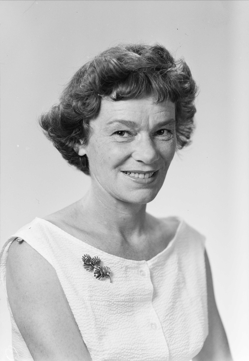 Berit Winge Brænne var en norsk skuespiller, barnebokforfatter og låtskriver.